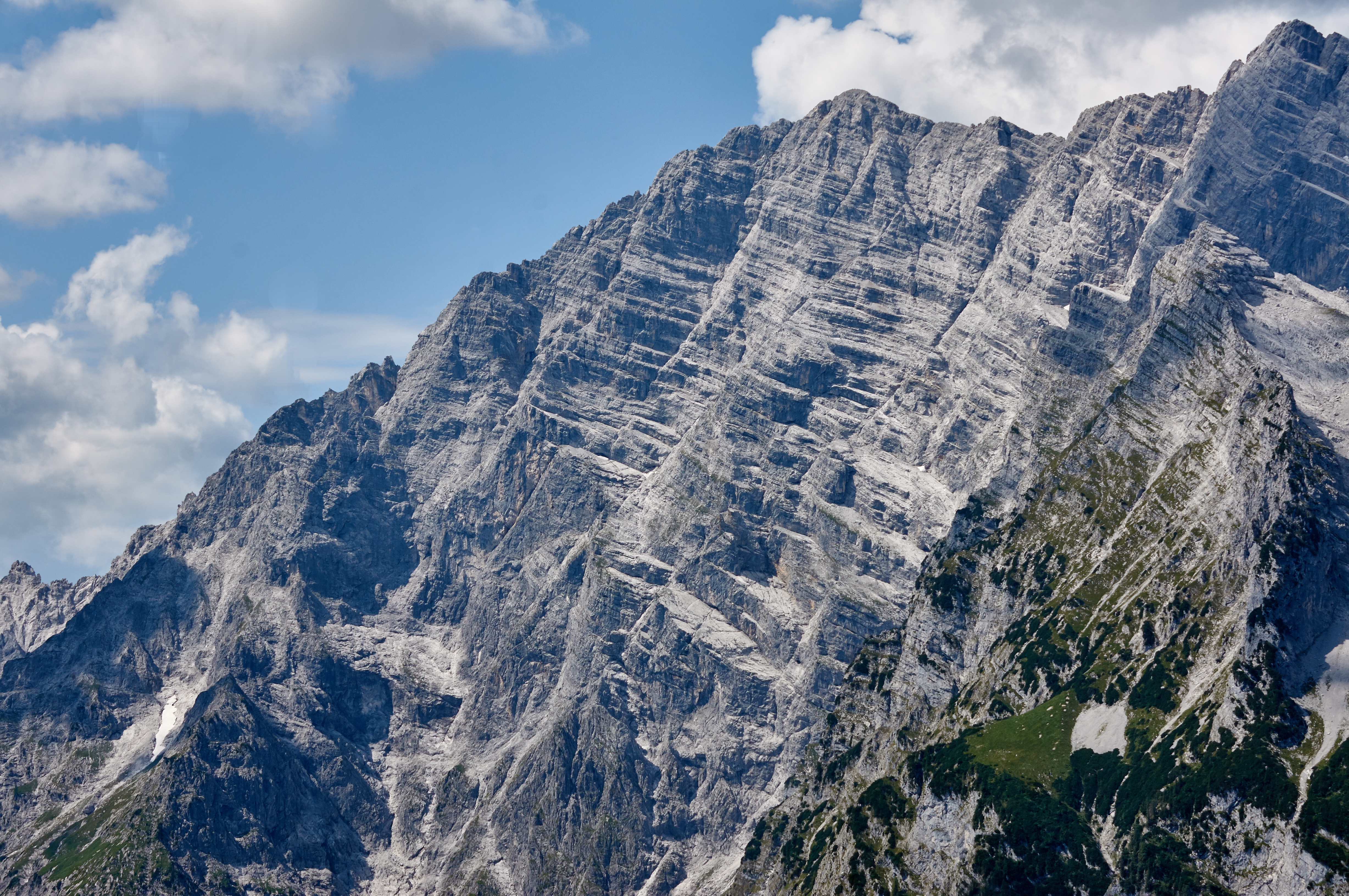 Die Watzmann-Ostwand mit der 2712 m hohen Watzmann-Südspitze. This is an image of the Biosphere Reserve or a Geopark: Berchtesgaden Alps Biosphere Reserve